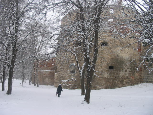 Berezhany Castle, western Ukraine